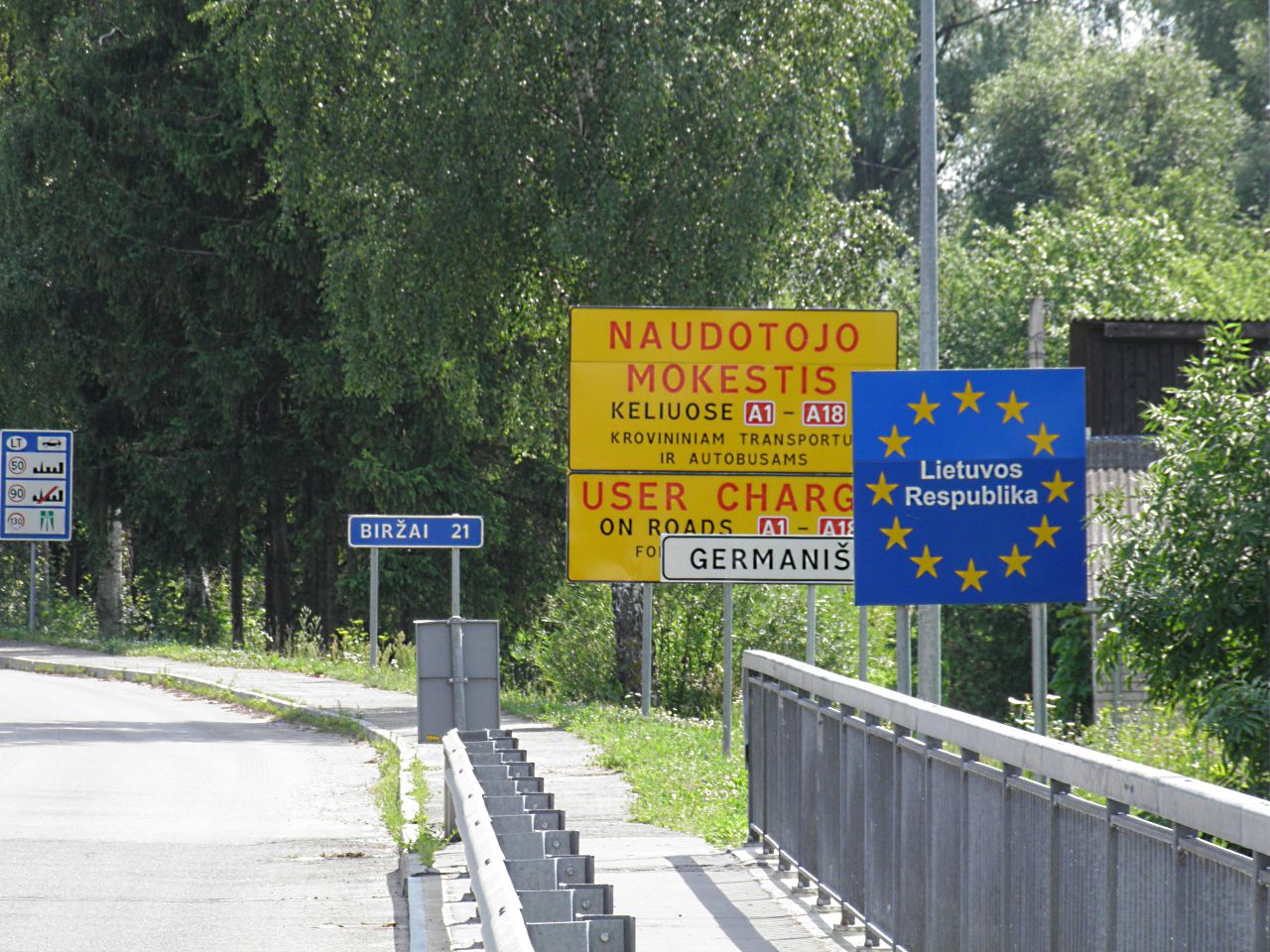 граница-4